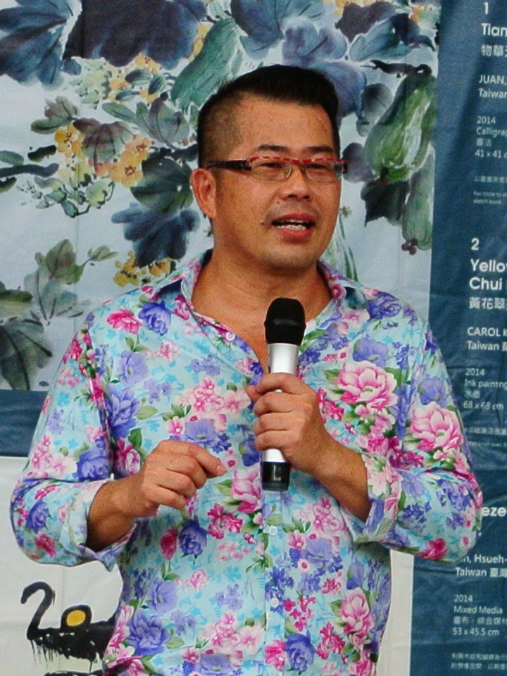 中文（台灣）: 臺籍服裝設計師林國基至雲林縣立褒忠國民中學演說。